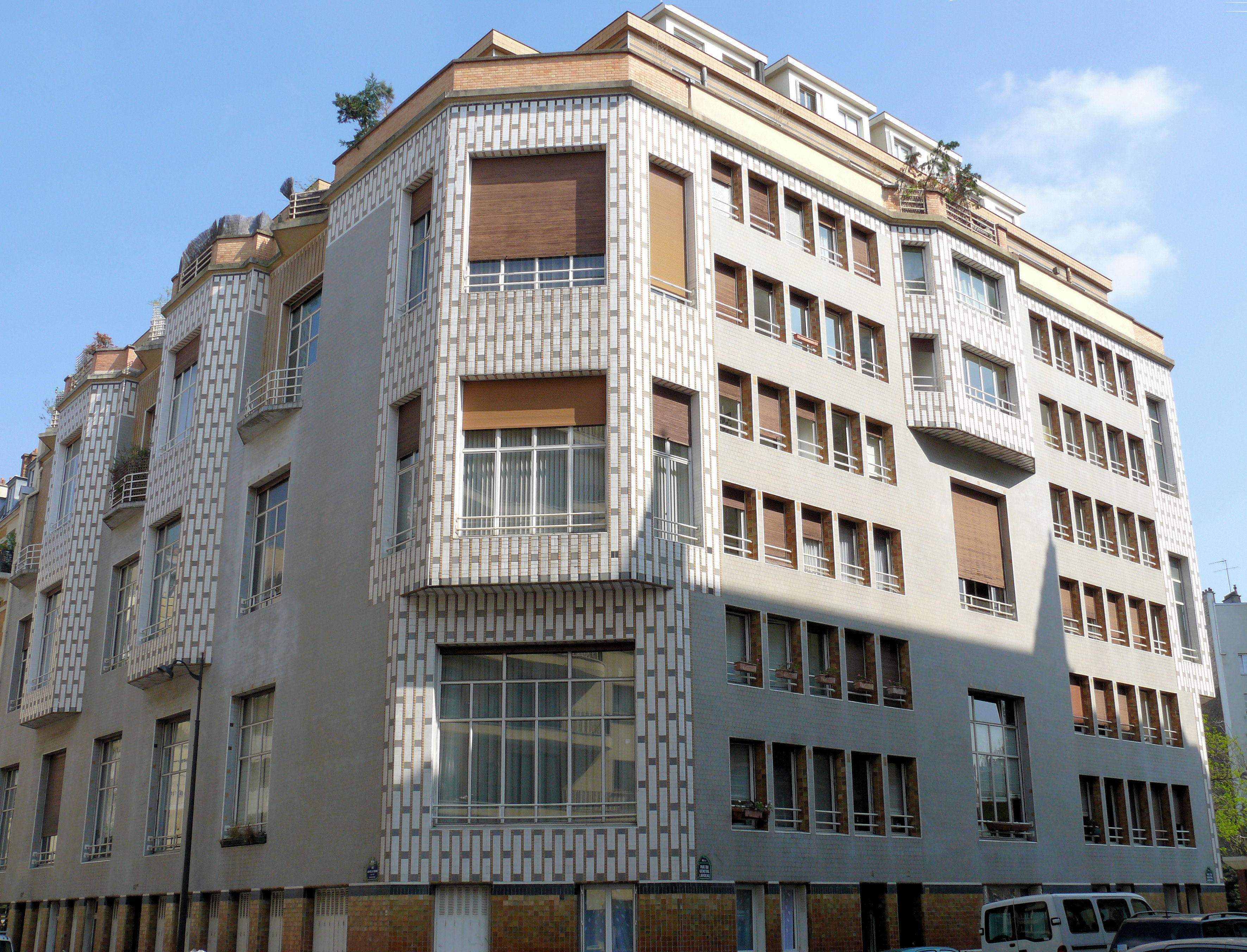 Paris 16ème arrondissement - Studio Building, 65 rue Jean de La Fontaine